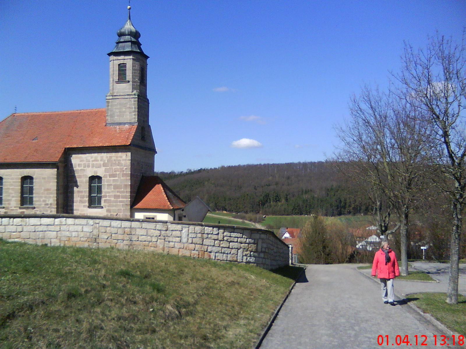 Dorsbrunn in Mittelfranken